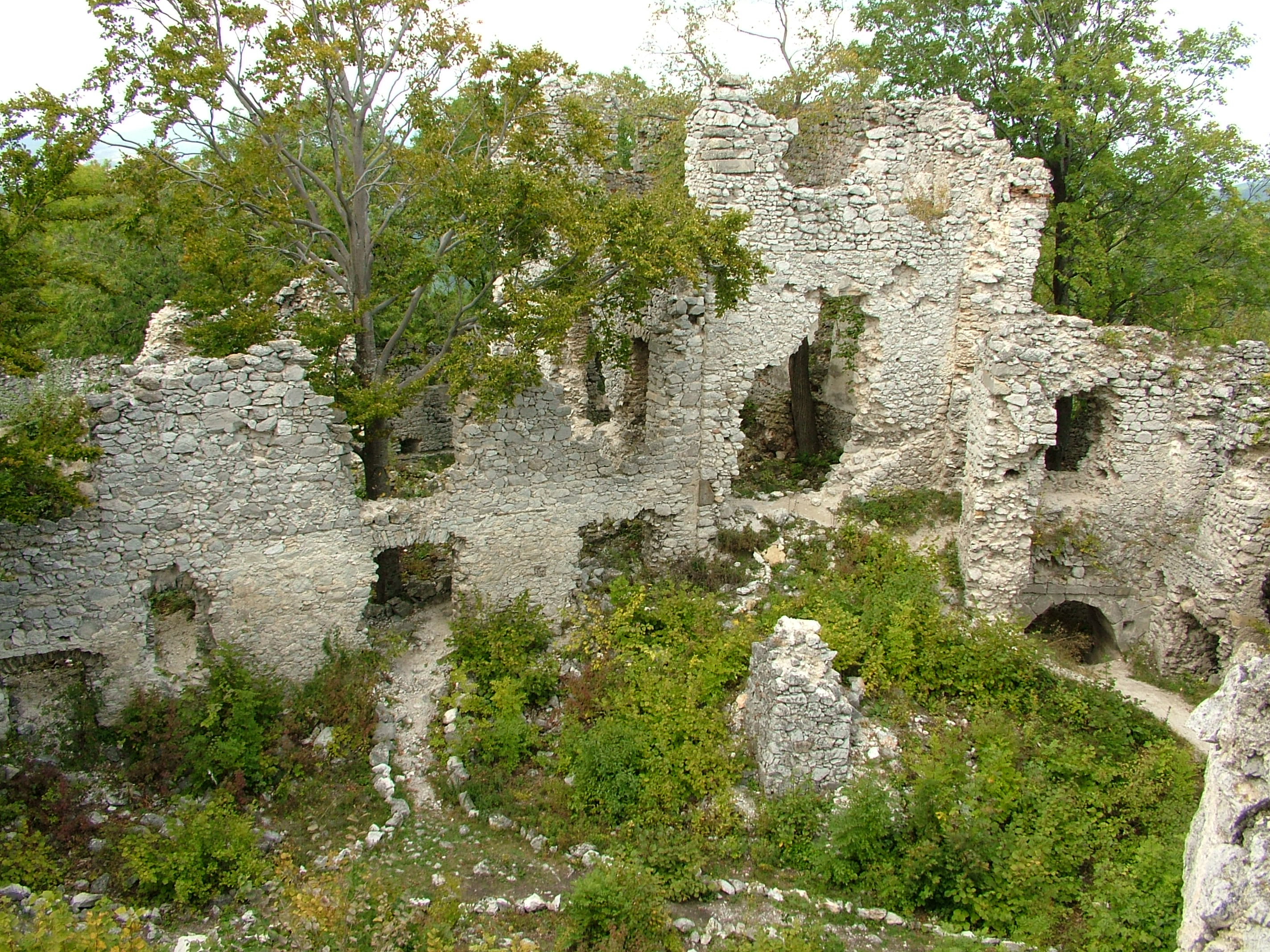 Hrad Tematín